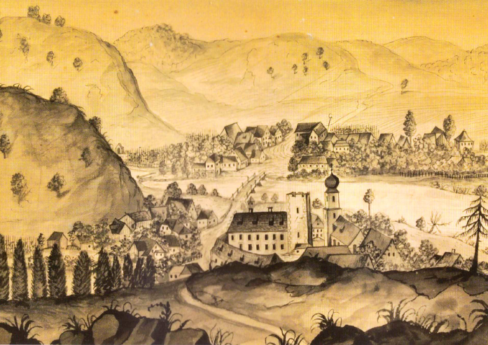 Schloss Emhofen